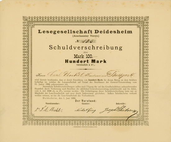 Schuldverschreibung über 100 Mark der Lesegesellschaft Deidesheim vom 1. Juni 1886